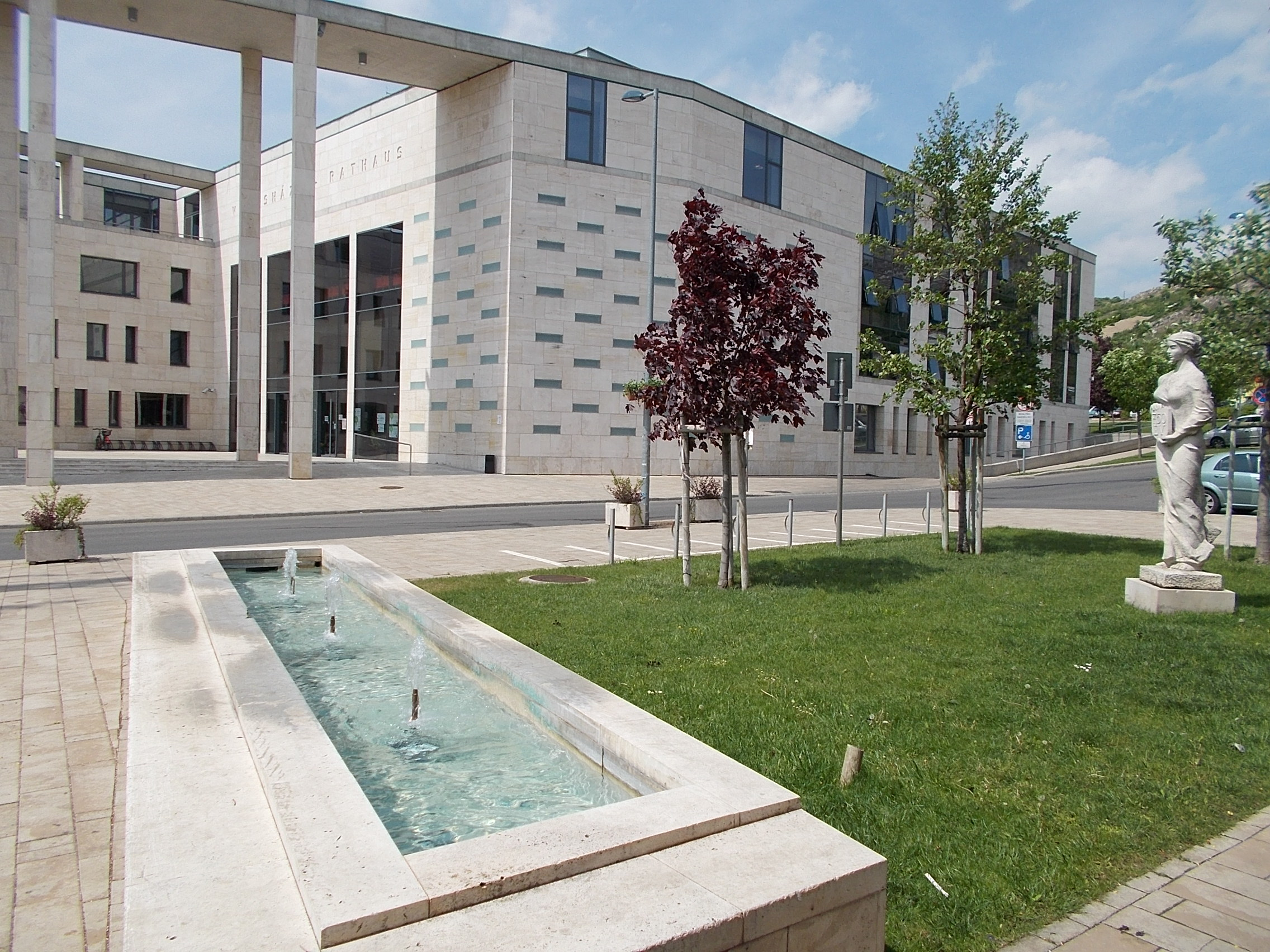 Budaörs Város Önkormányzata. Mészkő. (2005). Városköszöntő szobor (Bajnok Béla, 1987). - Budaörs, Szabadság út 134